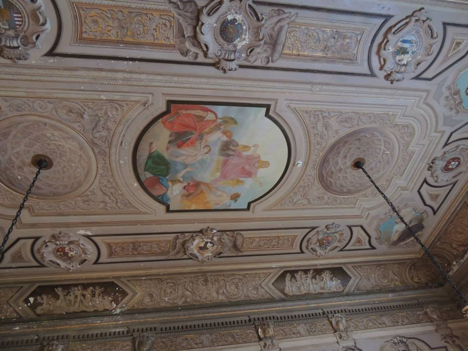 Museu Nacional, inclusive a Coleção Arqueológica Balbino de Freitas